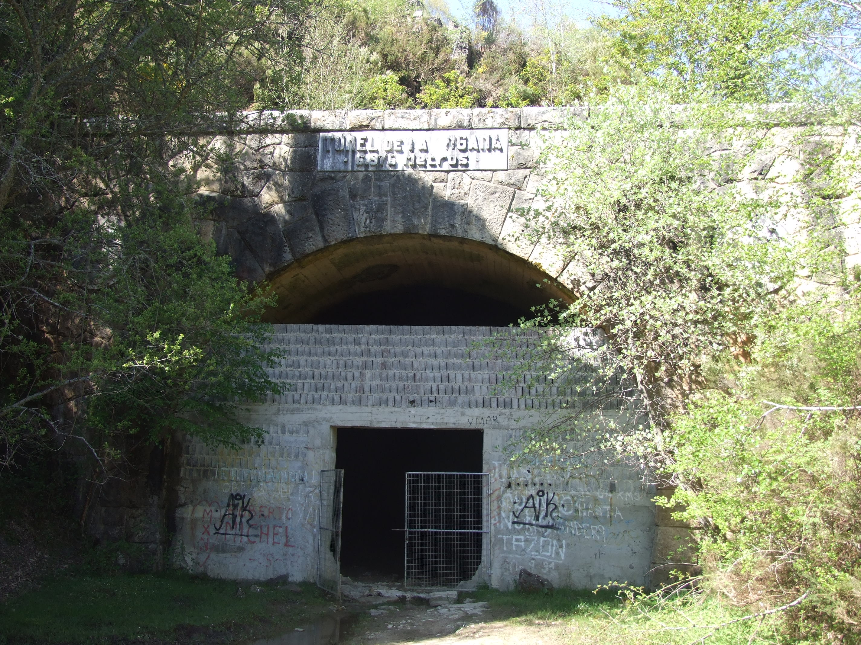 Entrada castellana al Túnel de la Engaña en mayo de 2013